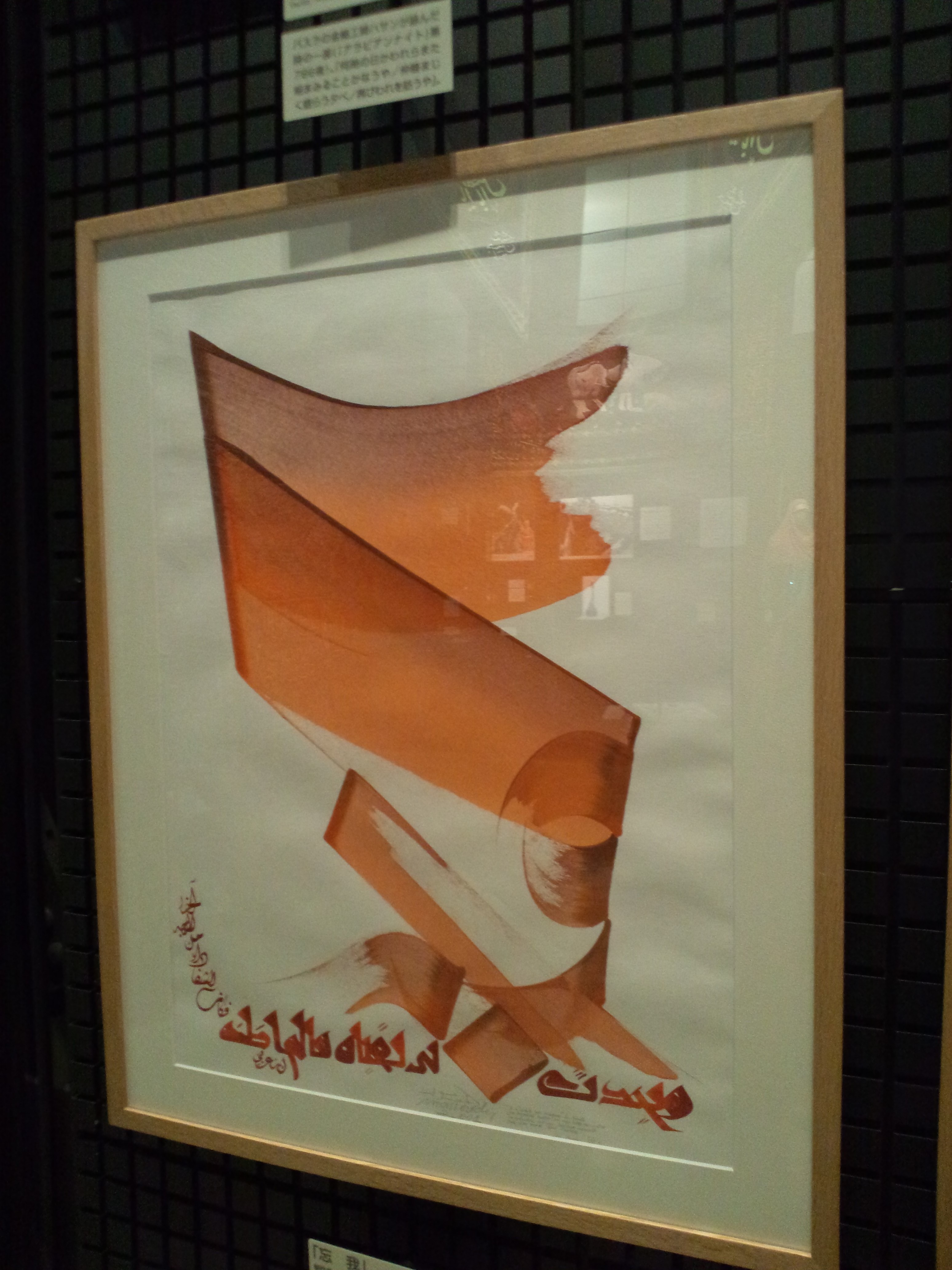 国立民族学博物館（大阪） イスラム書道「忘我」（フランス、パリ、制作者：ハサン・マスウーディー、2001年収集）